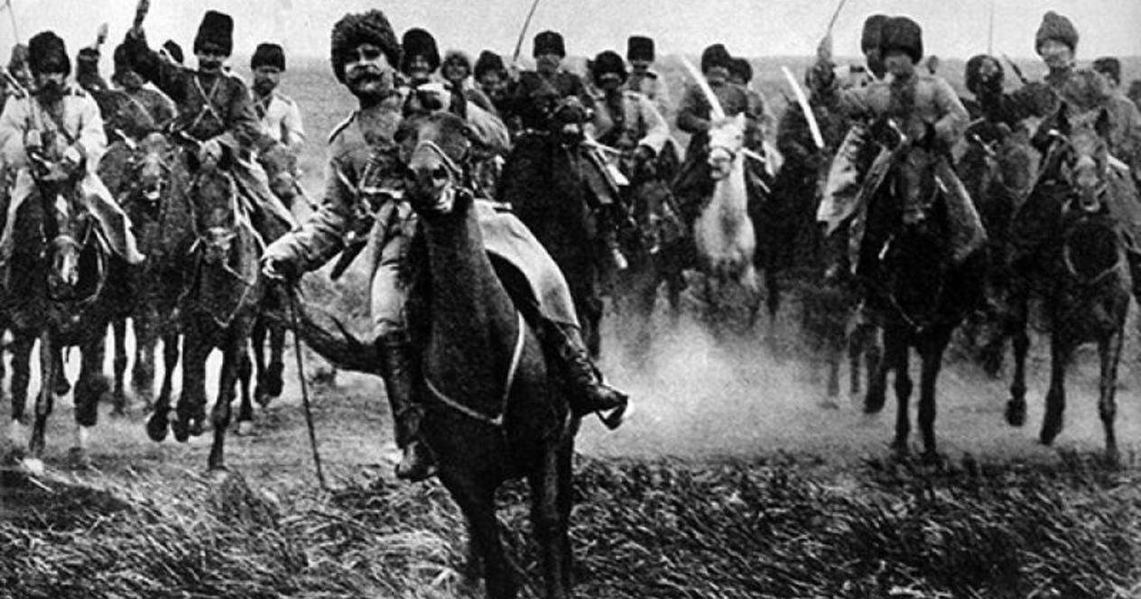 «В атаку!» // Великая война в образах и картинах : [в 14 вып.] / под ред. Ив. Лазаревского. — М.: Издание Д. Я. Маковского, 1914-1917 (Товарищество типографии А. И. Мамонтова); [Вып. 9]. — 1916. — С. 7.